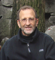 יצחק הדרי